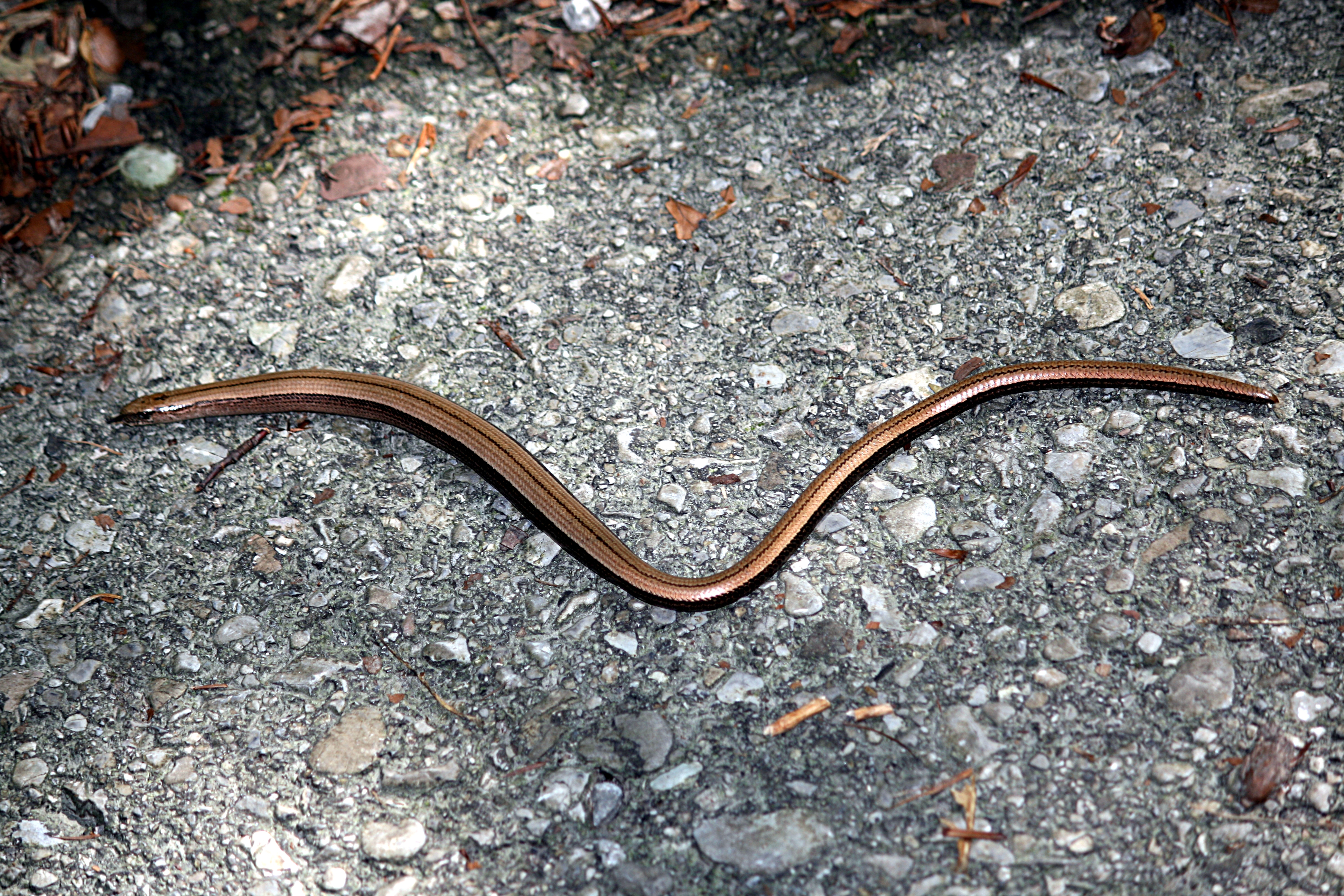 Anguis fragilis, Blindschleiche